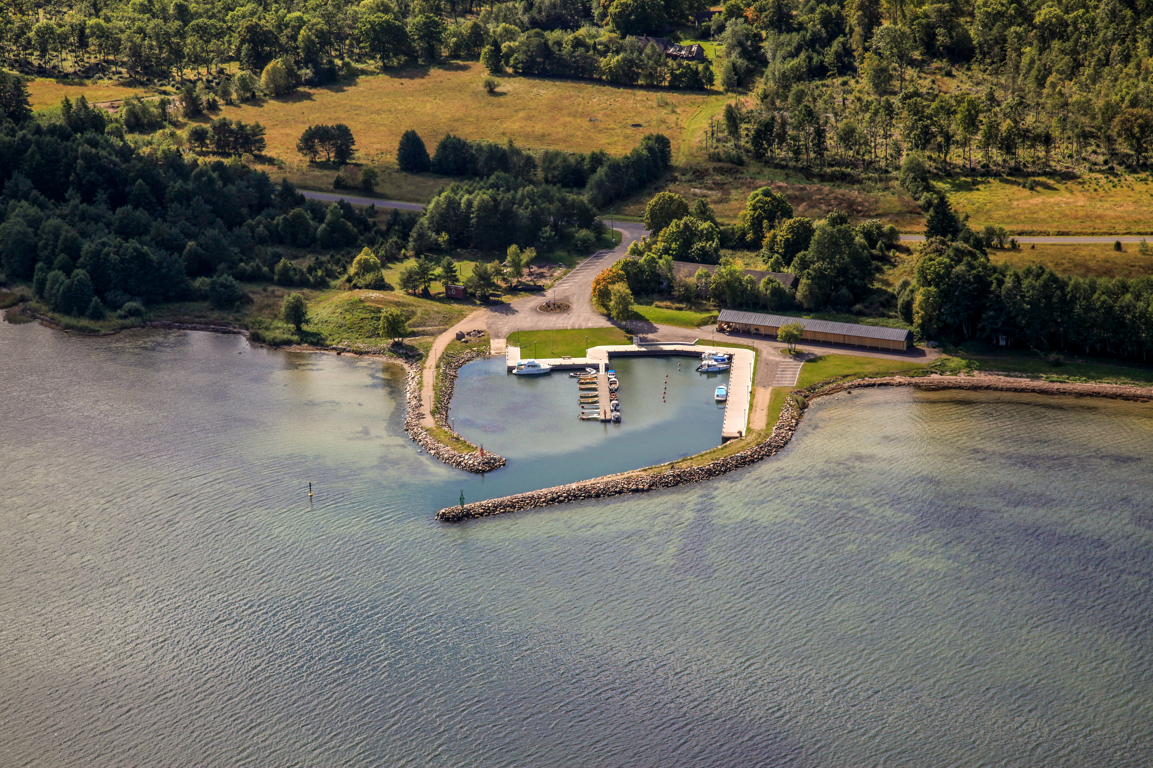 Soela sadam 2015